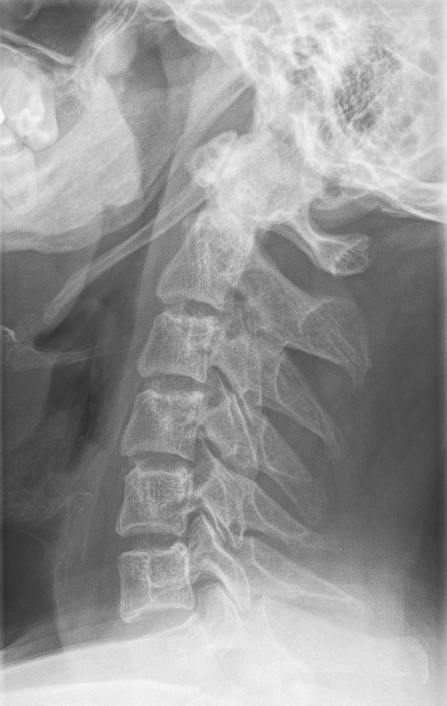 Eagle-Syndrom im seitlichen Röntgenbild. Der überlange Proc. styloideus bzw. die Verknöcherung des Lig. stylohyoideum ist gut erkennbar.